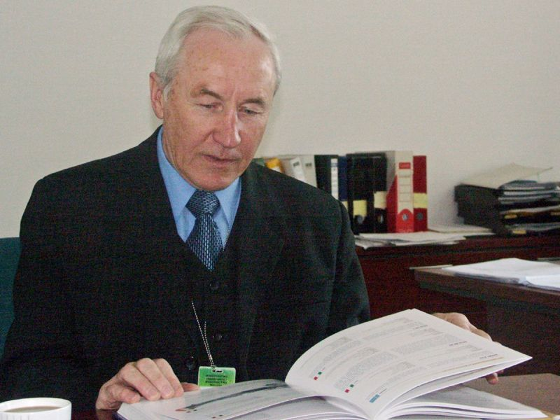 Edmund Klich (oficer lotnictwa) w biurze.